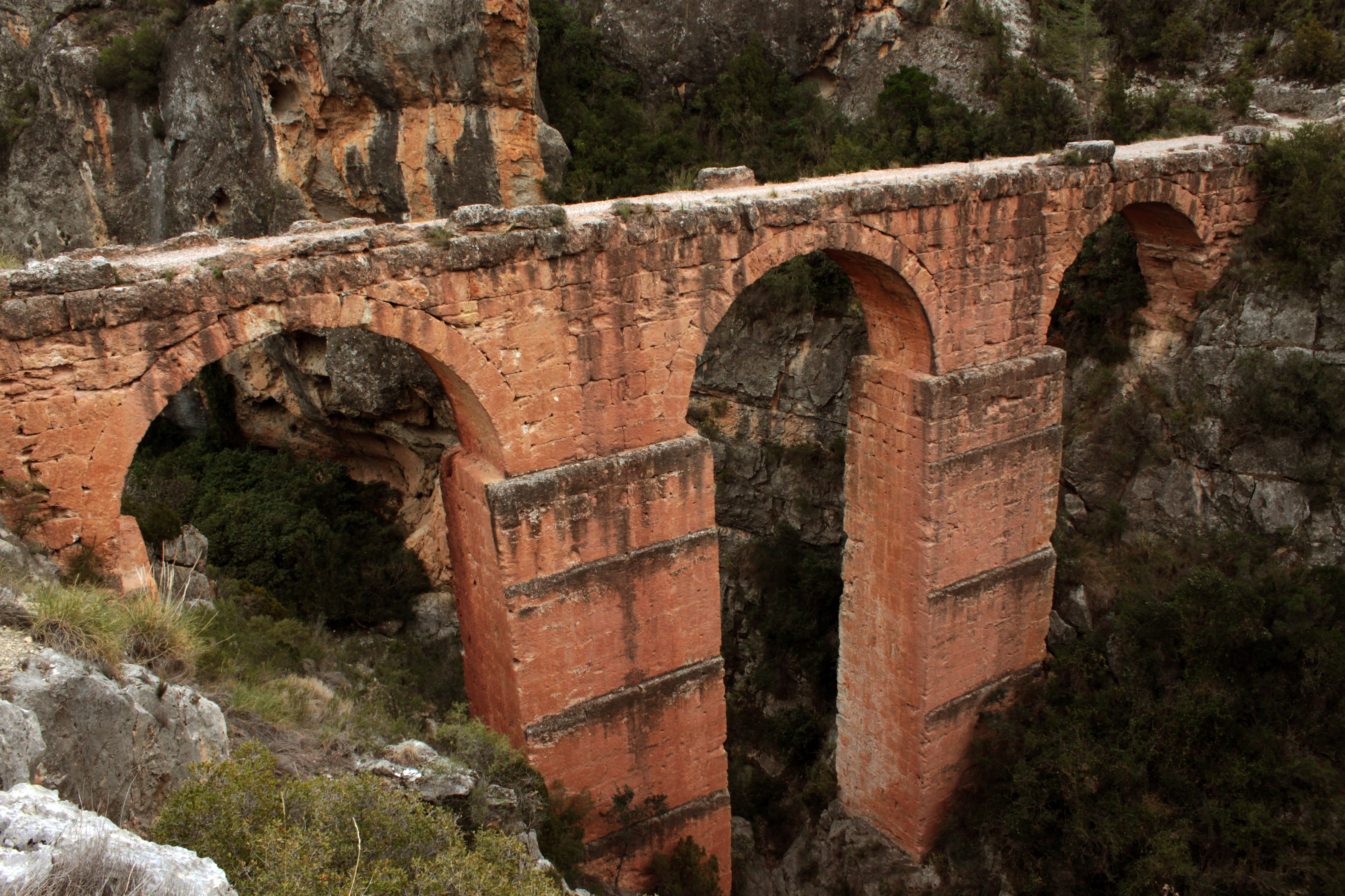 Acueducto de Peña Cortada. Obra romana construída para salvar el barranco de la cueva del Gato. El acueducto consta de tres arcos, tiene una longitud de 36 metros y una altura máxima de 18 metros. Localidad de Calles, provincia de Valencia, Comunidad valenciana.